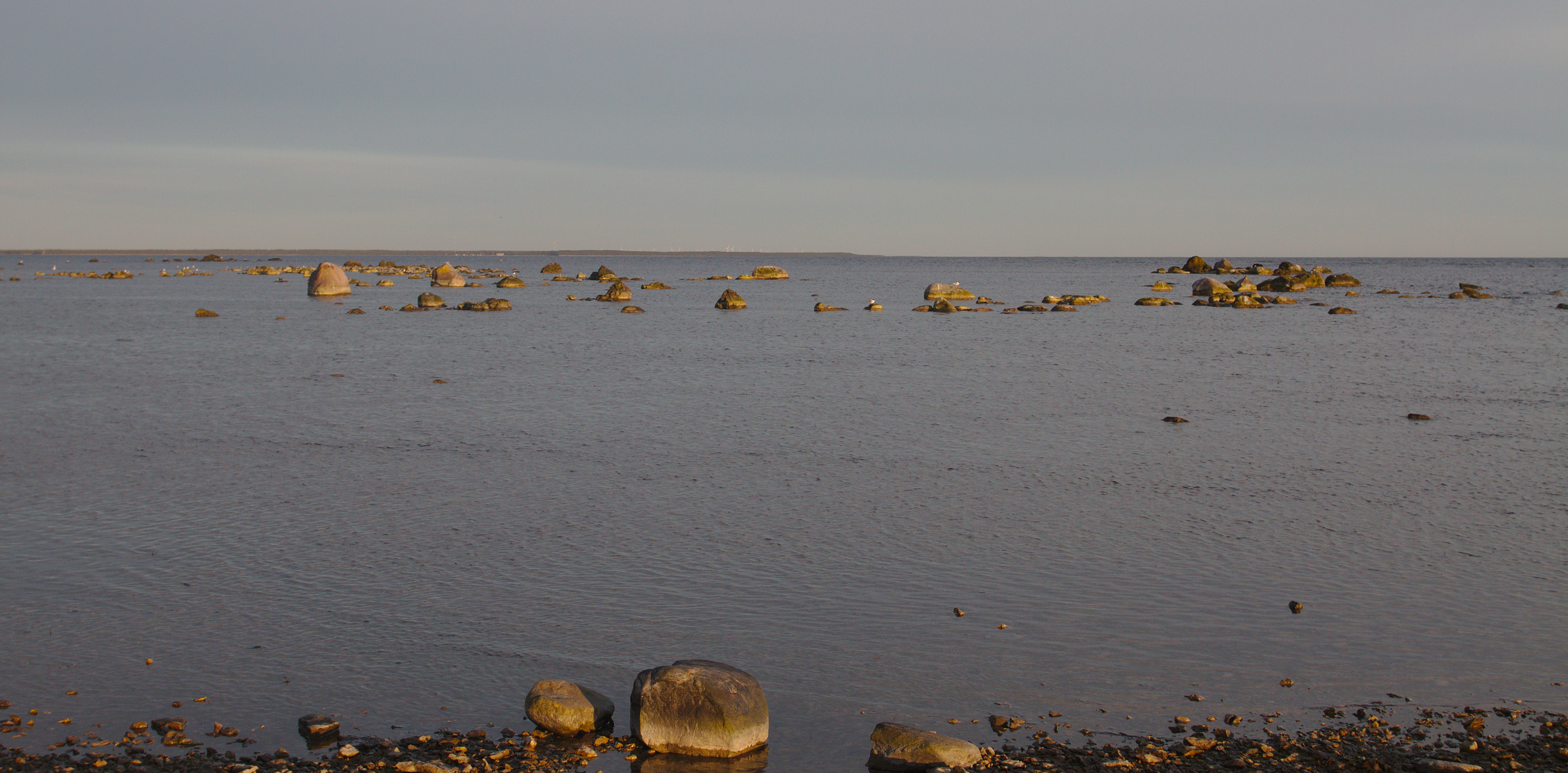 Osmussaare II rahnuderühma kivikülv. Kivikülv koosneb gneissbretšadest ja gneissidest